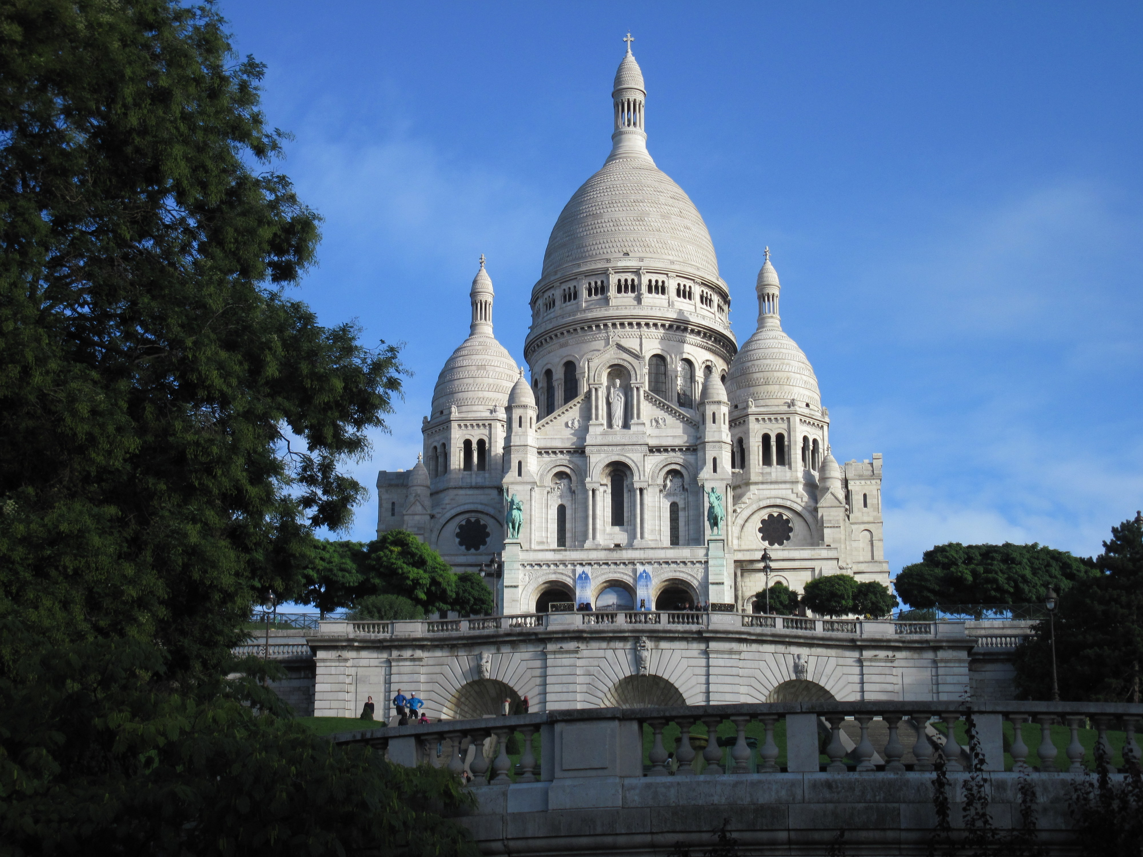 Basilique du Sacré-Cœur